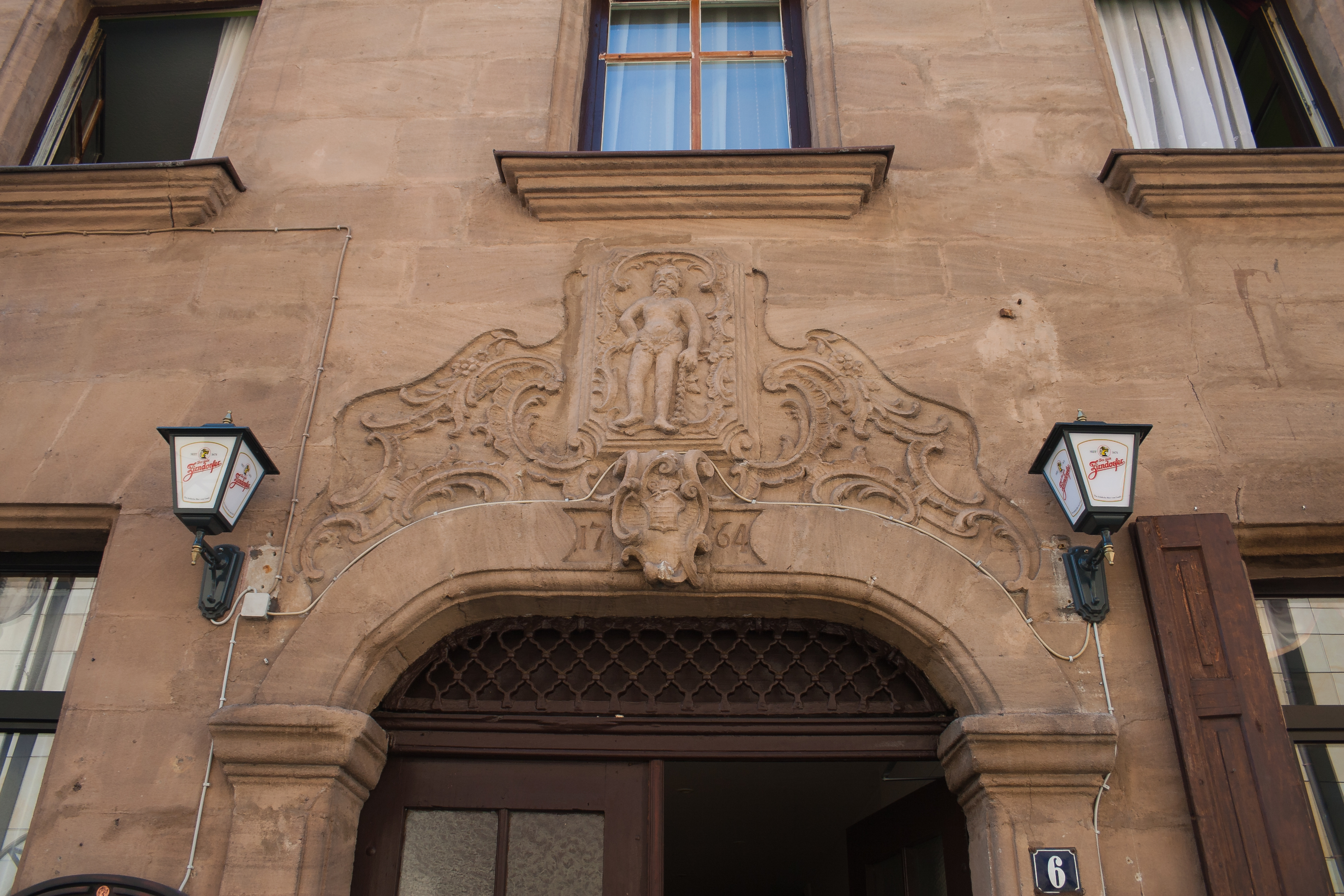 Fürth, Bavaria, Germany